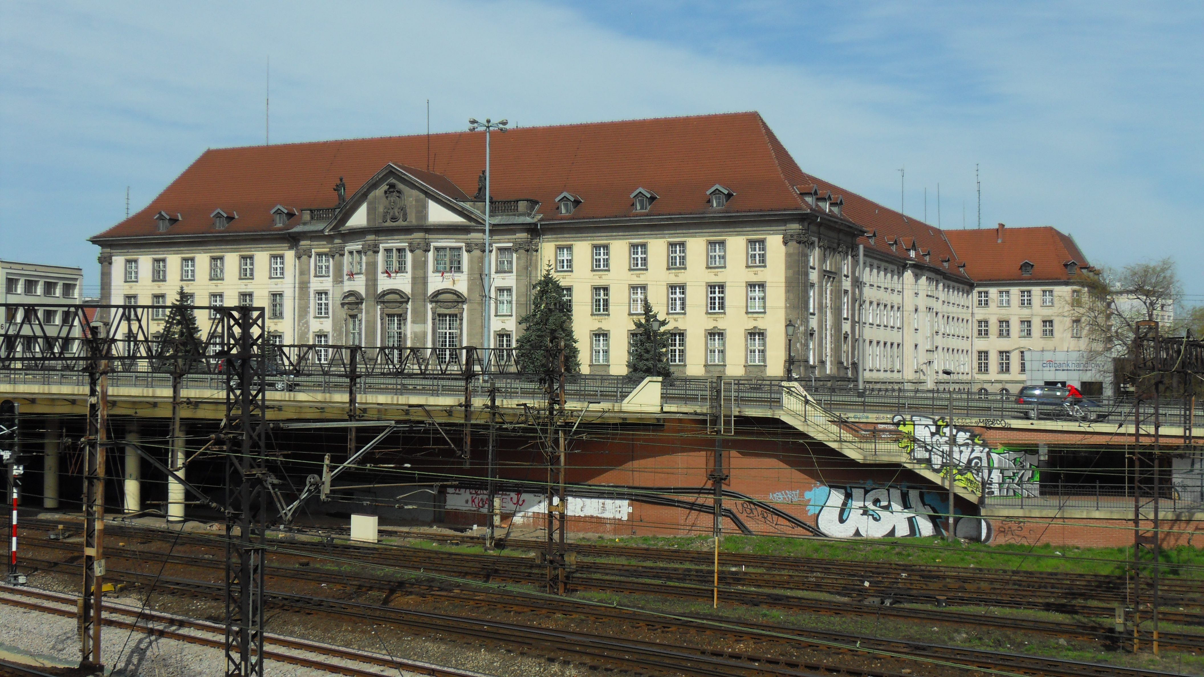 Gdańsk Śródmieście, ul. Dyrekcyjna 2/4 (Dyrekcja Kolei) i wiadukt "Błędnik". Na pierwszym planie infrastuktura stacji Gdańsk Główny.